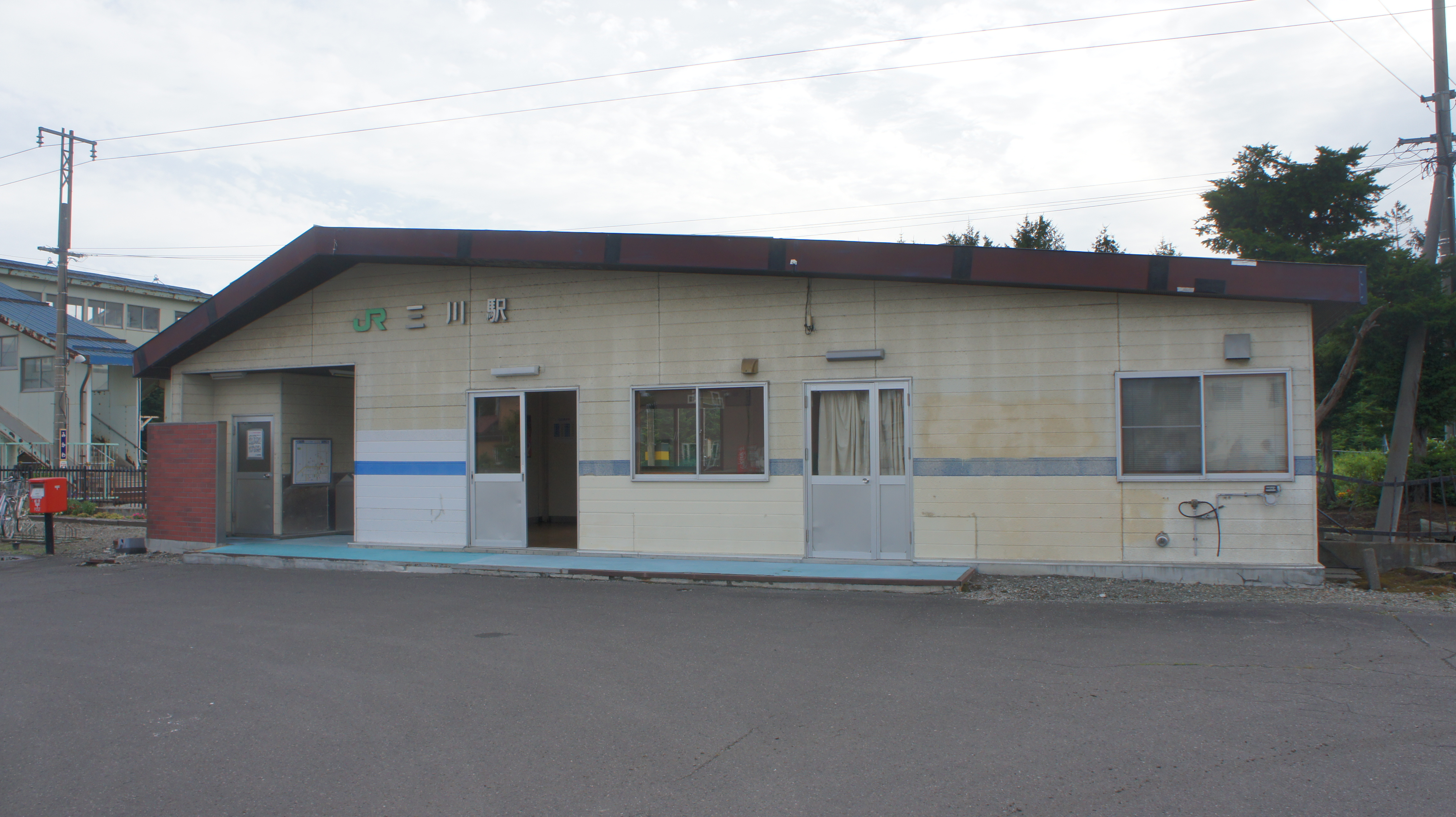 JR室蘭本線・三川駅の駅舎